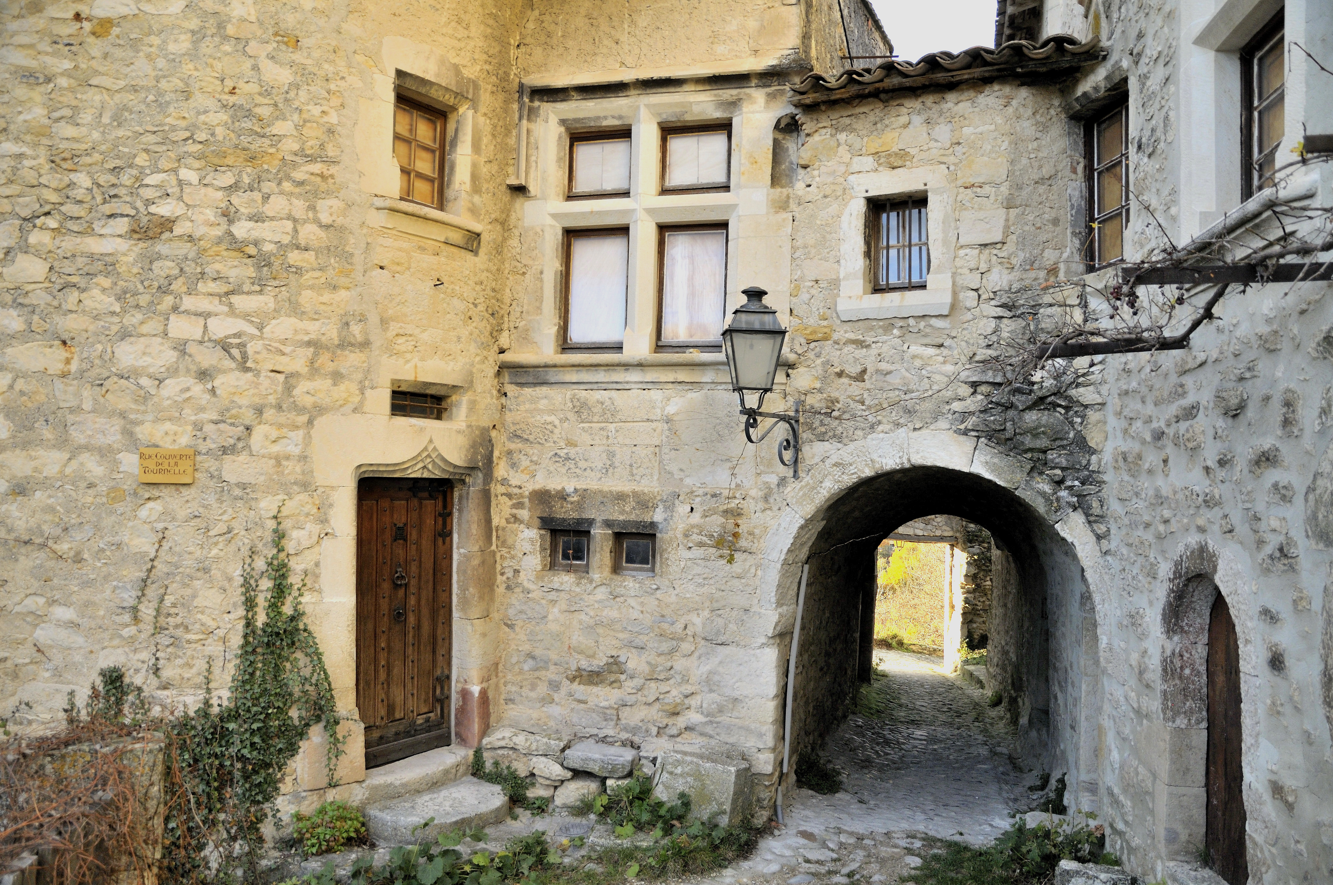 vieille maison du village